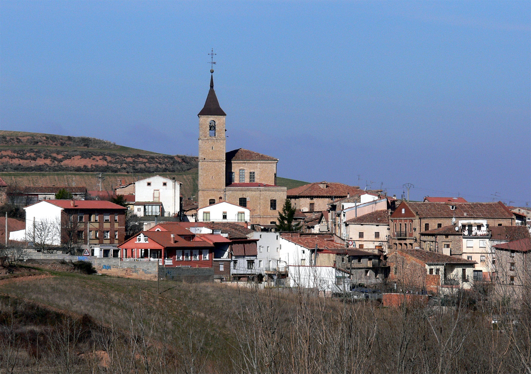 Vista general de Berceo, La Rioja - España.